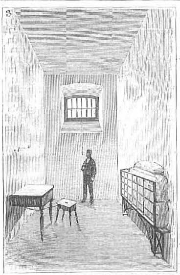 Interior de la Cárcel Modelo de Madrid, en la revista española La Ilustración Española y Americana.